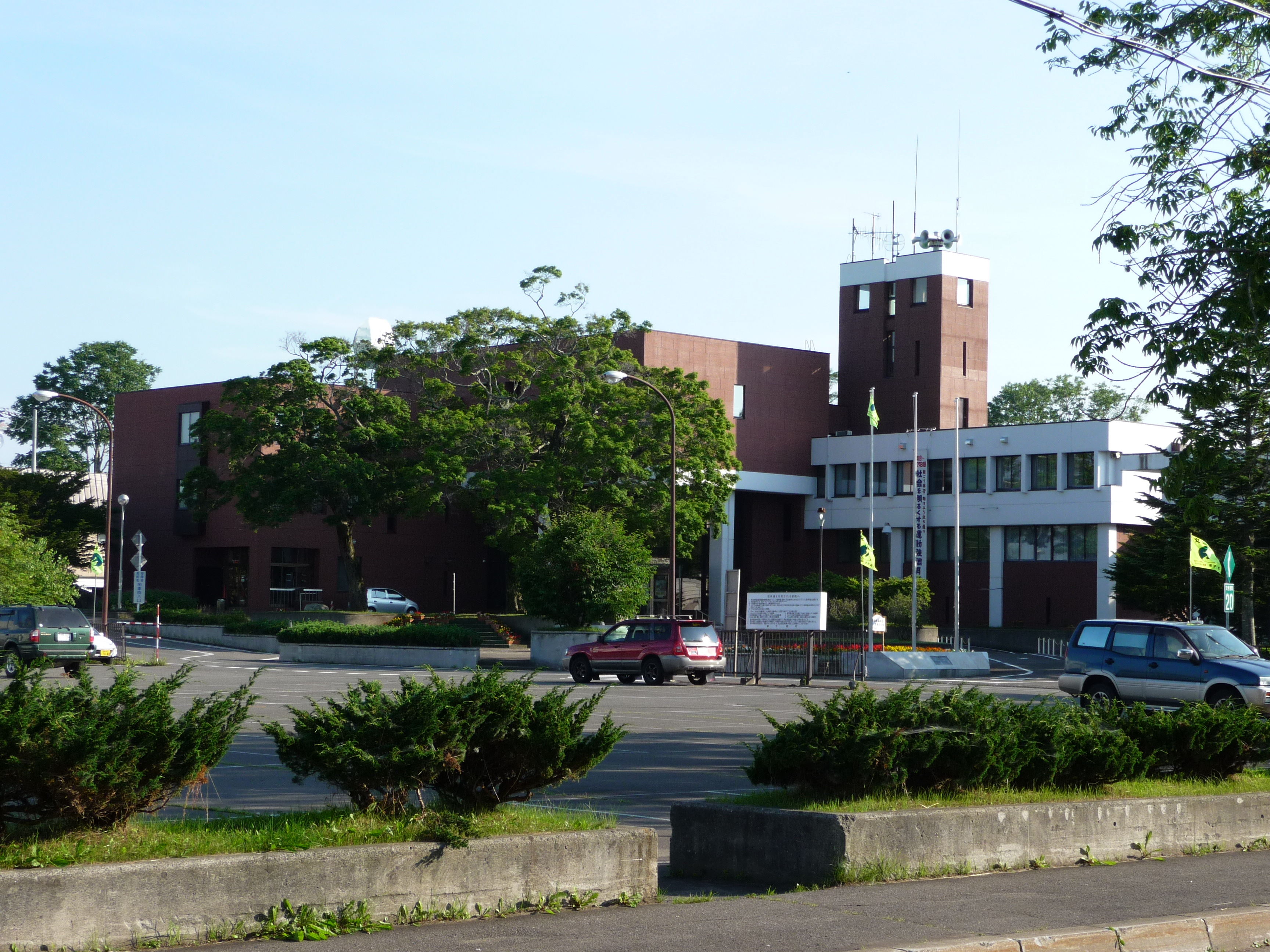 弟子屈町役場庁舎